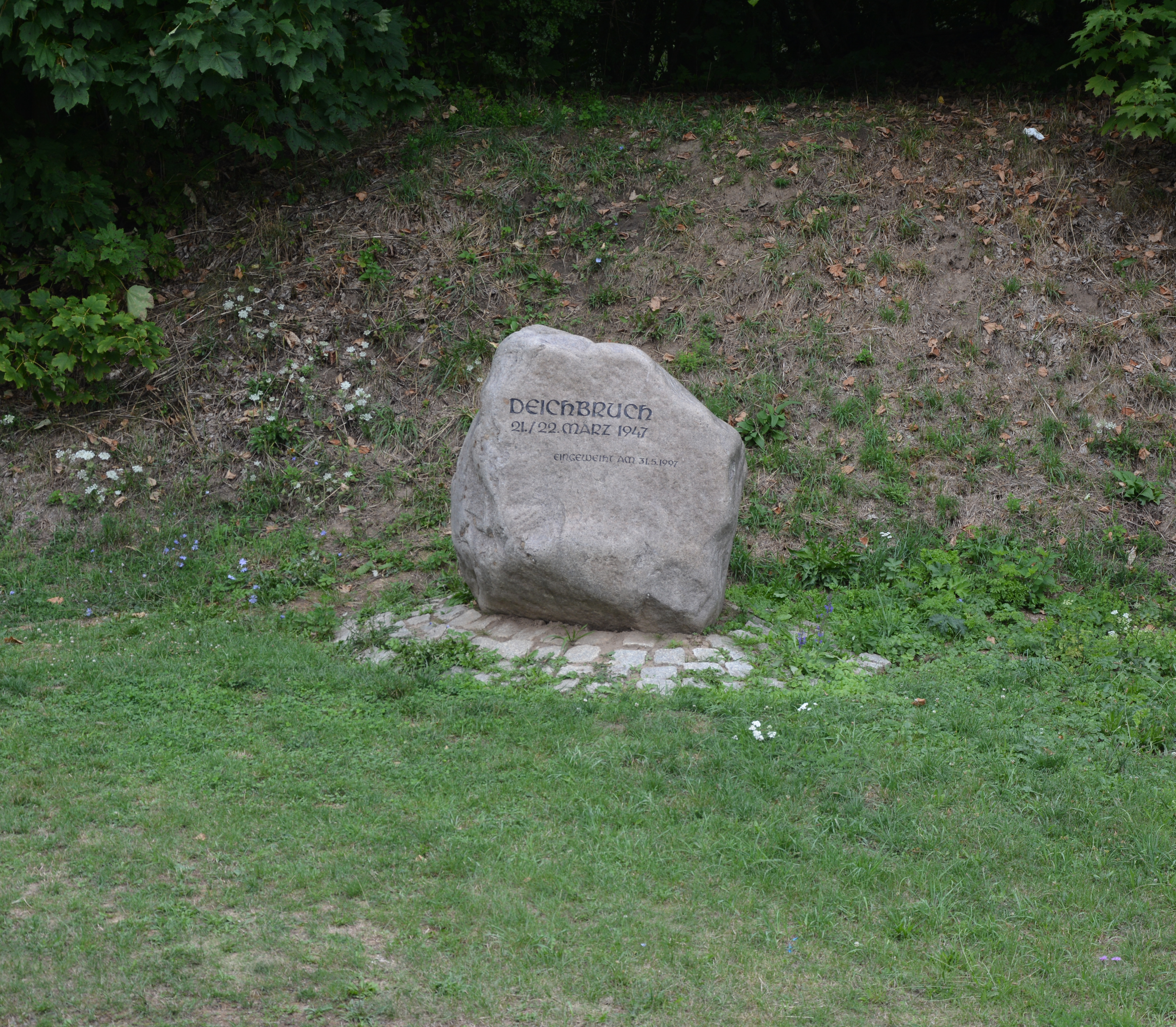 Gedenkstein für die Oderflutkatastrophe 1947 an der Deichbruchstelle bei Reitwein